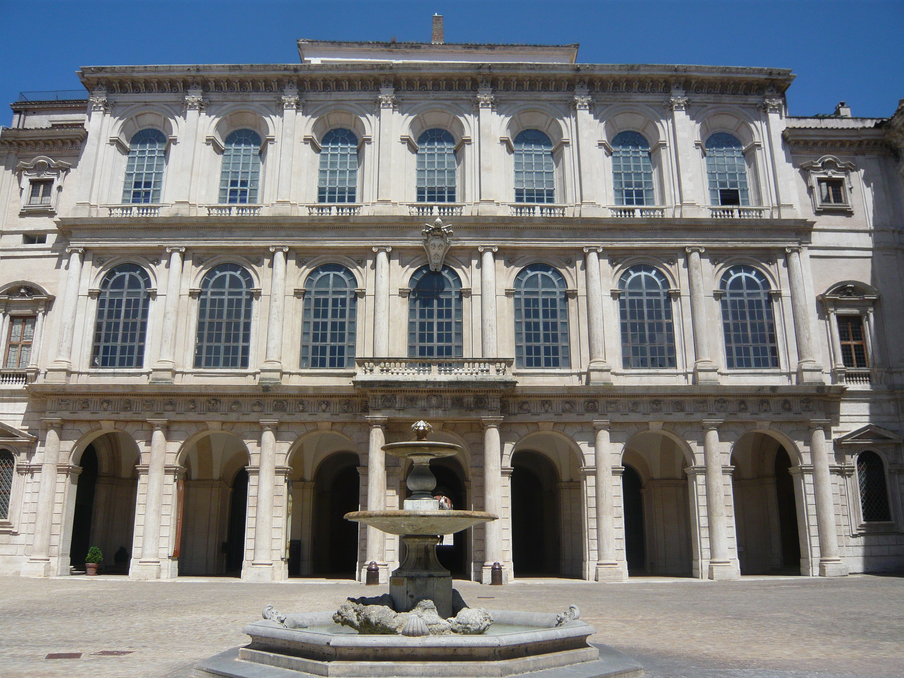 Facade avant du palais Barberini. Rome